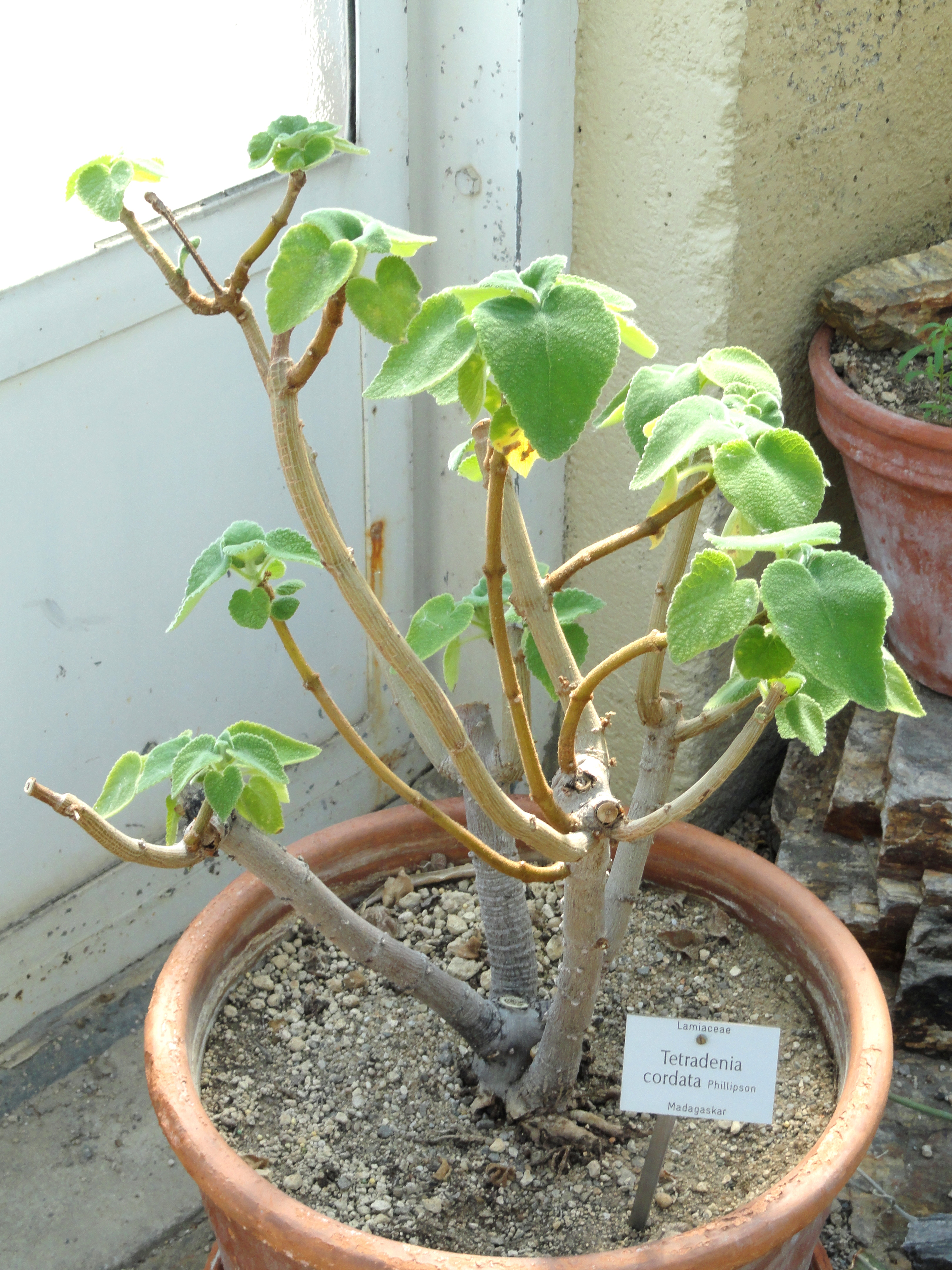 Tetradenia cordata specimen in the Botanischer Garten München-Nymphenburg, Munich, Germany.